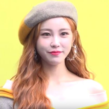 소연, 전효성, 조현영이 17일 오전 서울 동대문디자인플라자(DDP)에서 열린 '라이 서울 패션 위크 S/S 2020 컬렉션'에 참석했다.